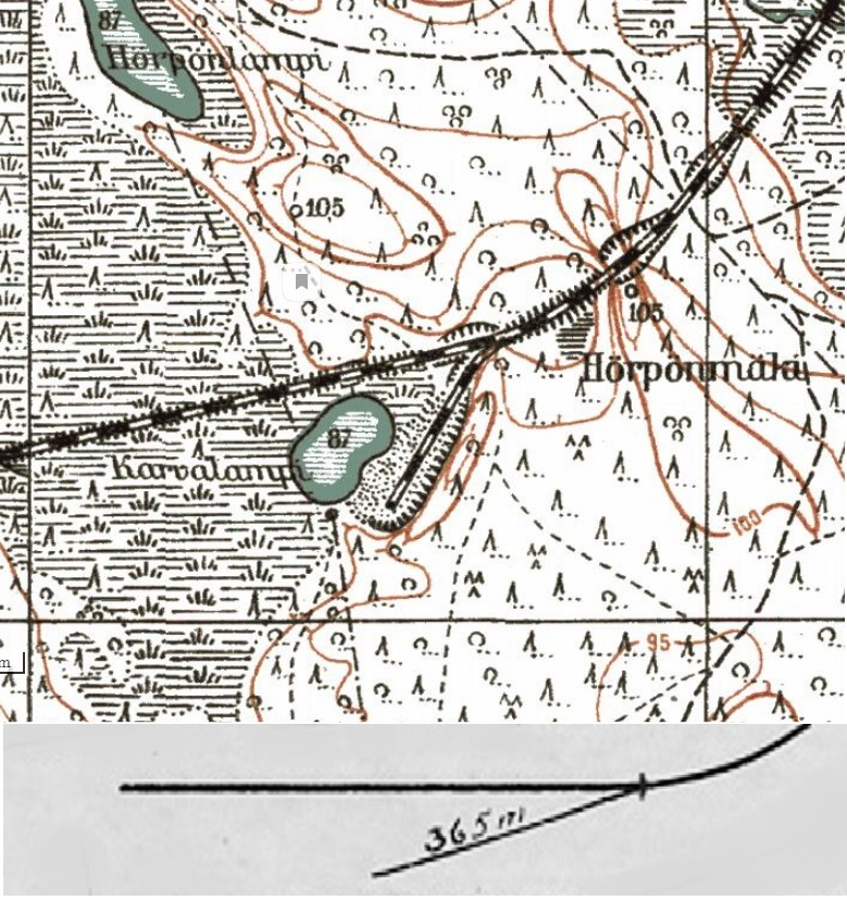 Карта и схема путевого поста Хёрппё.